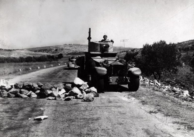 Tiberias